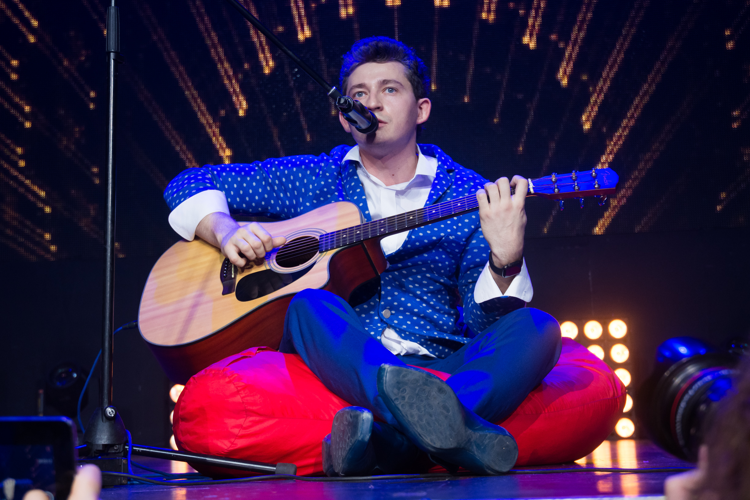 Коля Серга на концерте «Девичник Teens» (Известия Hall, 03.03.2016)